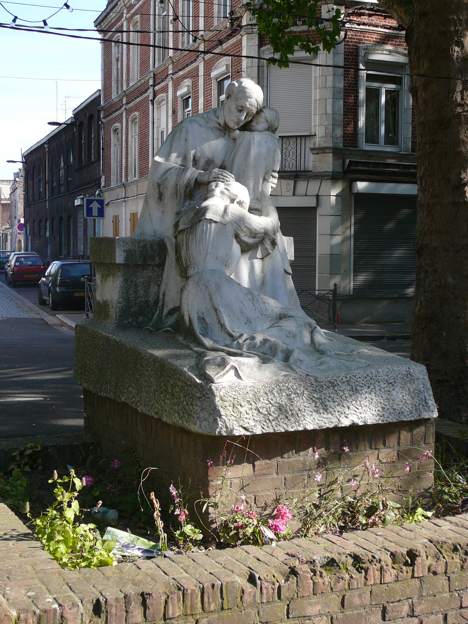 Statue, place Vanhoenacker à Lille, intitulée "le Pardon" par Georges-Armand VÉREZ (1877-1933). Sculpture exposée au Salon des artistes français de 1909-. Réf